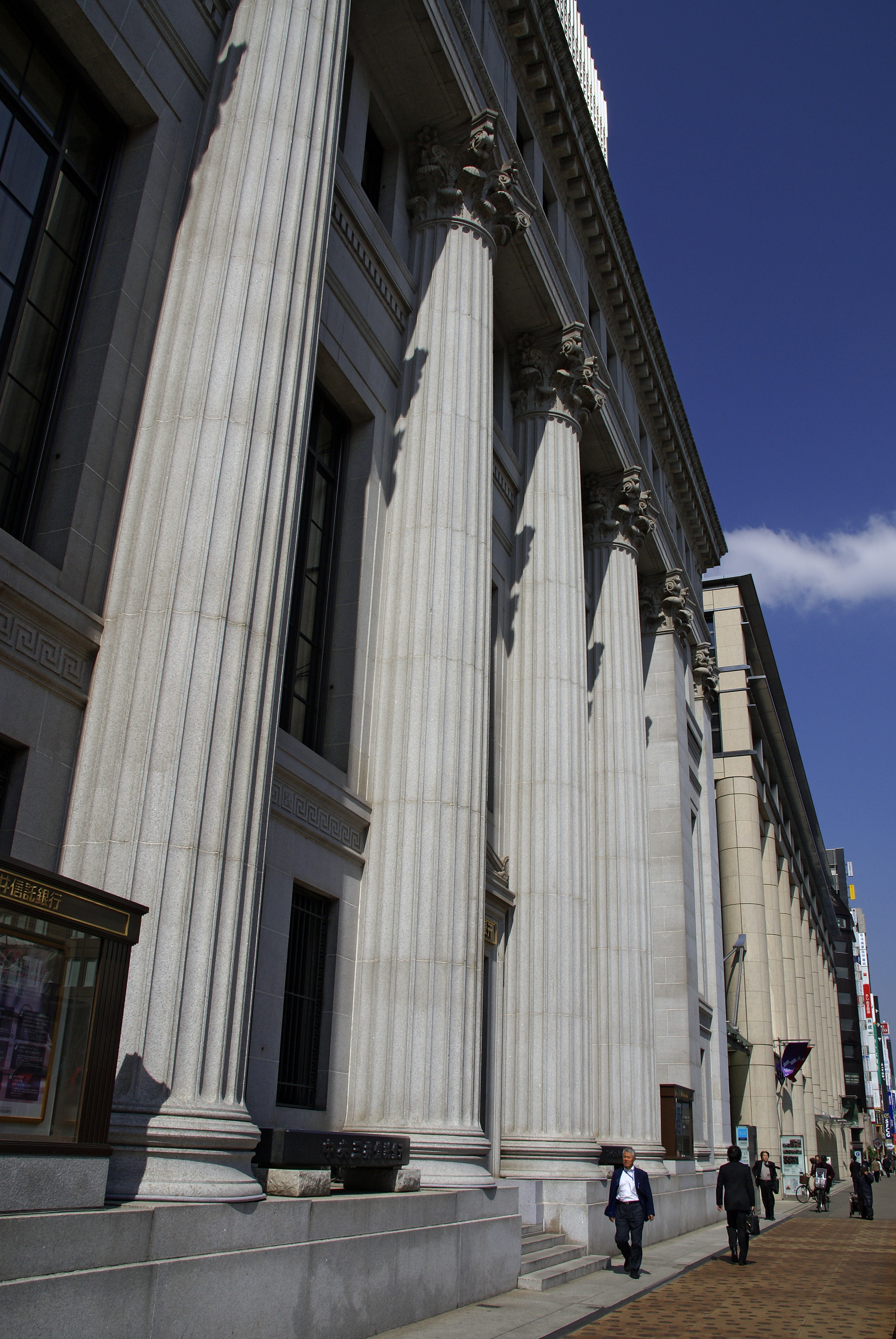 Mitsui Main Building in Chuo-ku, Tokyo, Japan